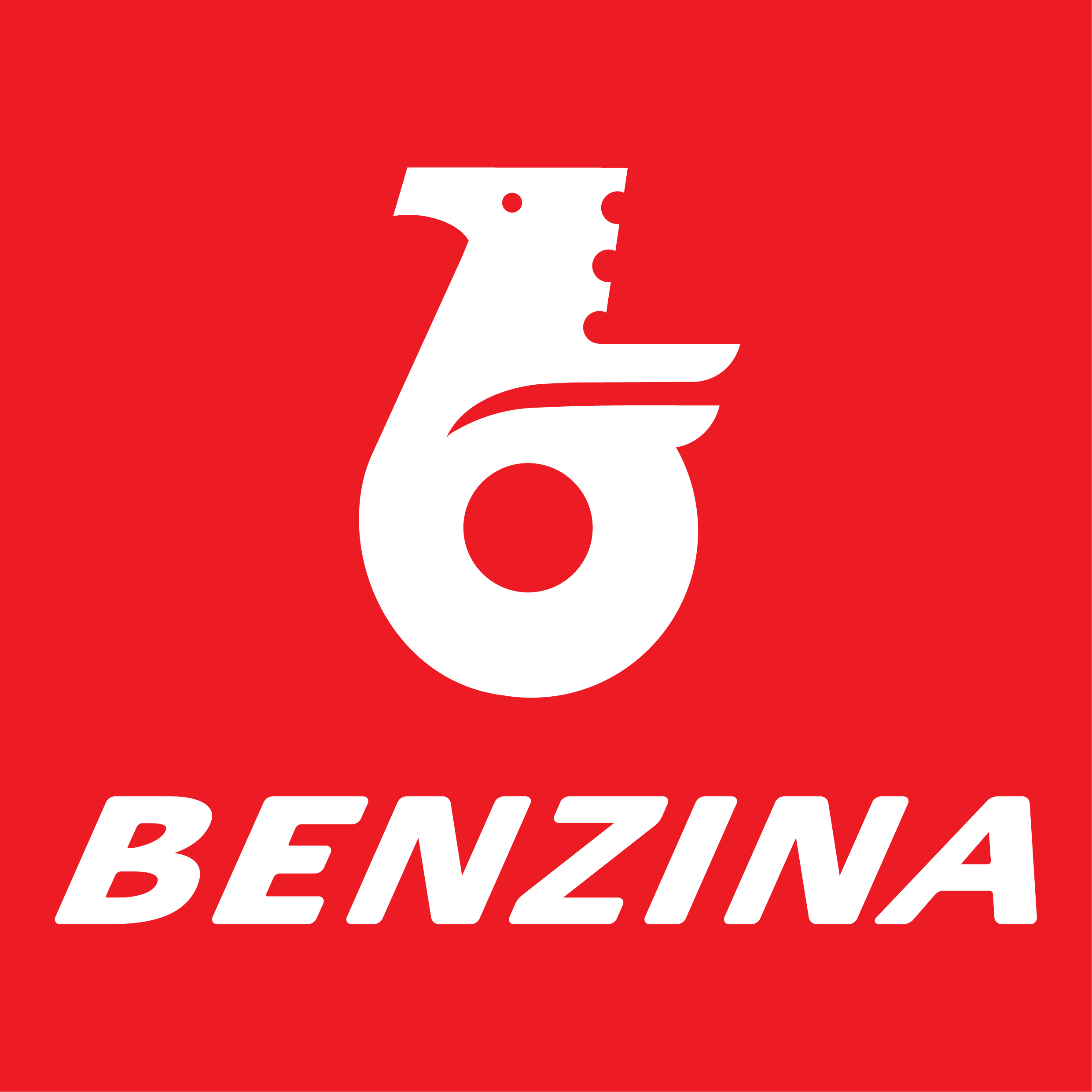 Benzina